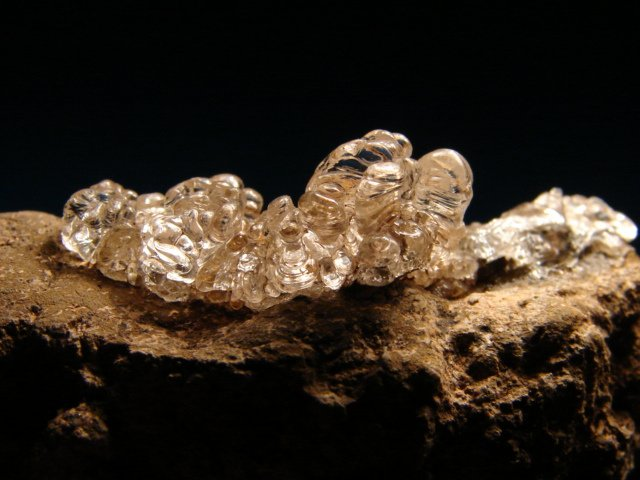 hialit, opal szklany, pochodzenie Czechy, okolice Podboran; autor zdjęcia Piotr Gut 2006